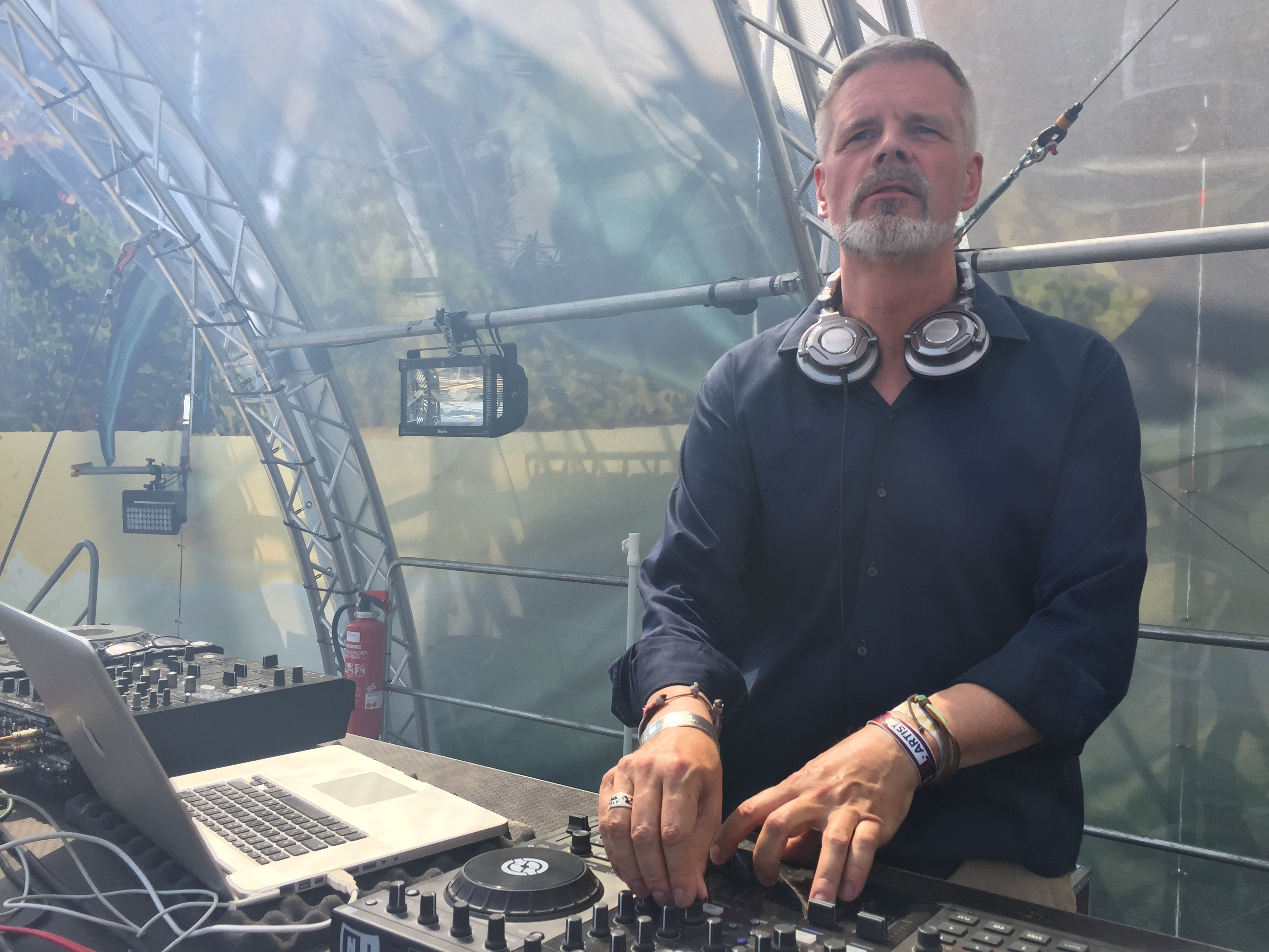 Deichbrand Festival